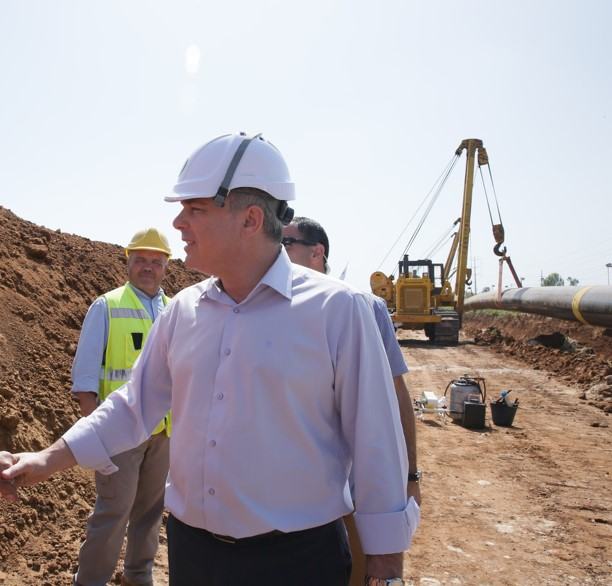 יובל שטייניץ בסיור בנתג"ז